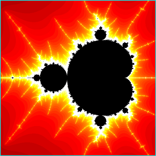 Imagen realizada por M.Romero Schmidkte ✉, especialmente para la Enciclopedia Libre y para la Wikipedia.